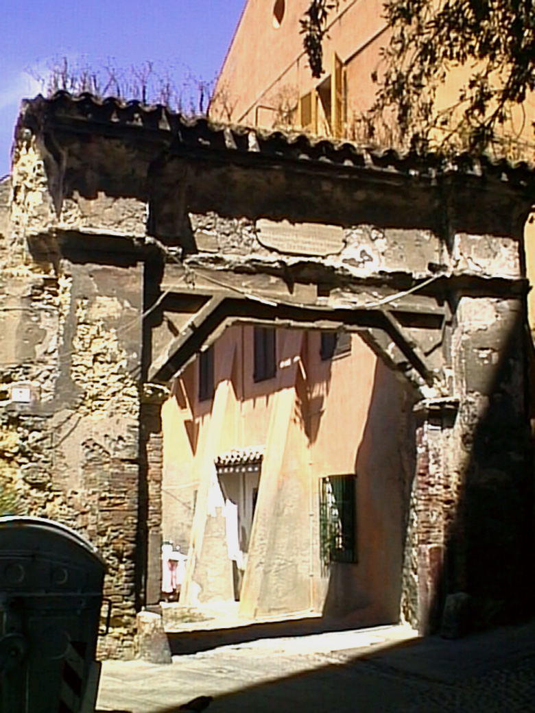 arco di accesso alla ex caserma San Carlo in via Santa Croce, Cagliari